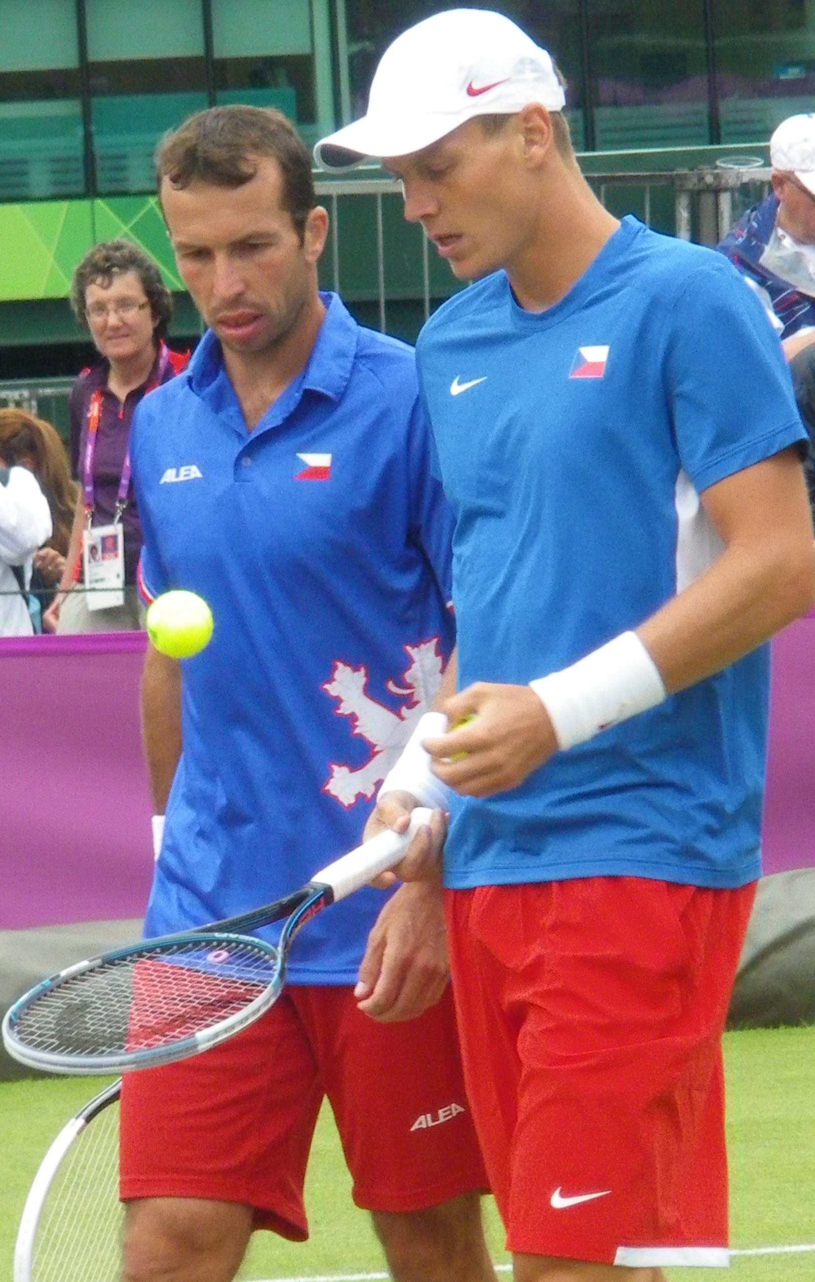 Čeští tenisté Tomáš Berdych a Radek Štěpánek v prvním kole dvouhry mužů na letních olympijakých hrách v Londýně 2012.